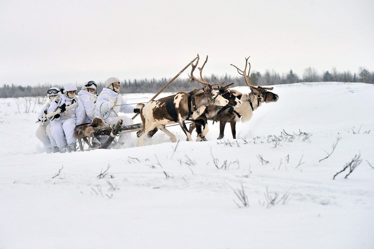 Занятия по управлению оленьими и собачьими упряжками с военнослужащими 80-й отдельной арктической мотострелковой бригады Северного флота (поселок Ловозеро, Мурманская область).